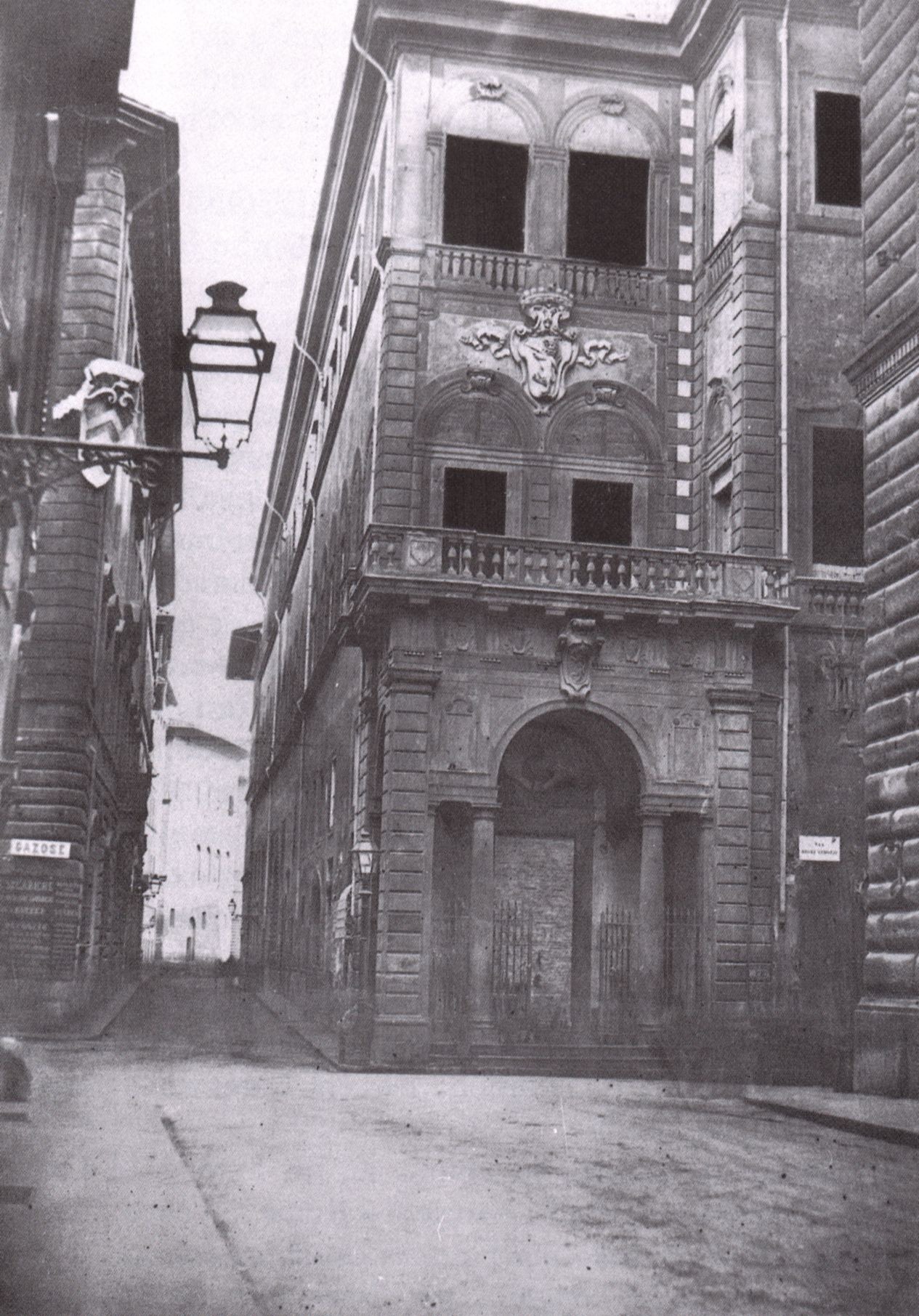 see description